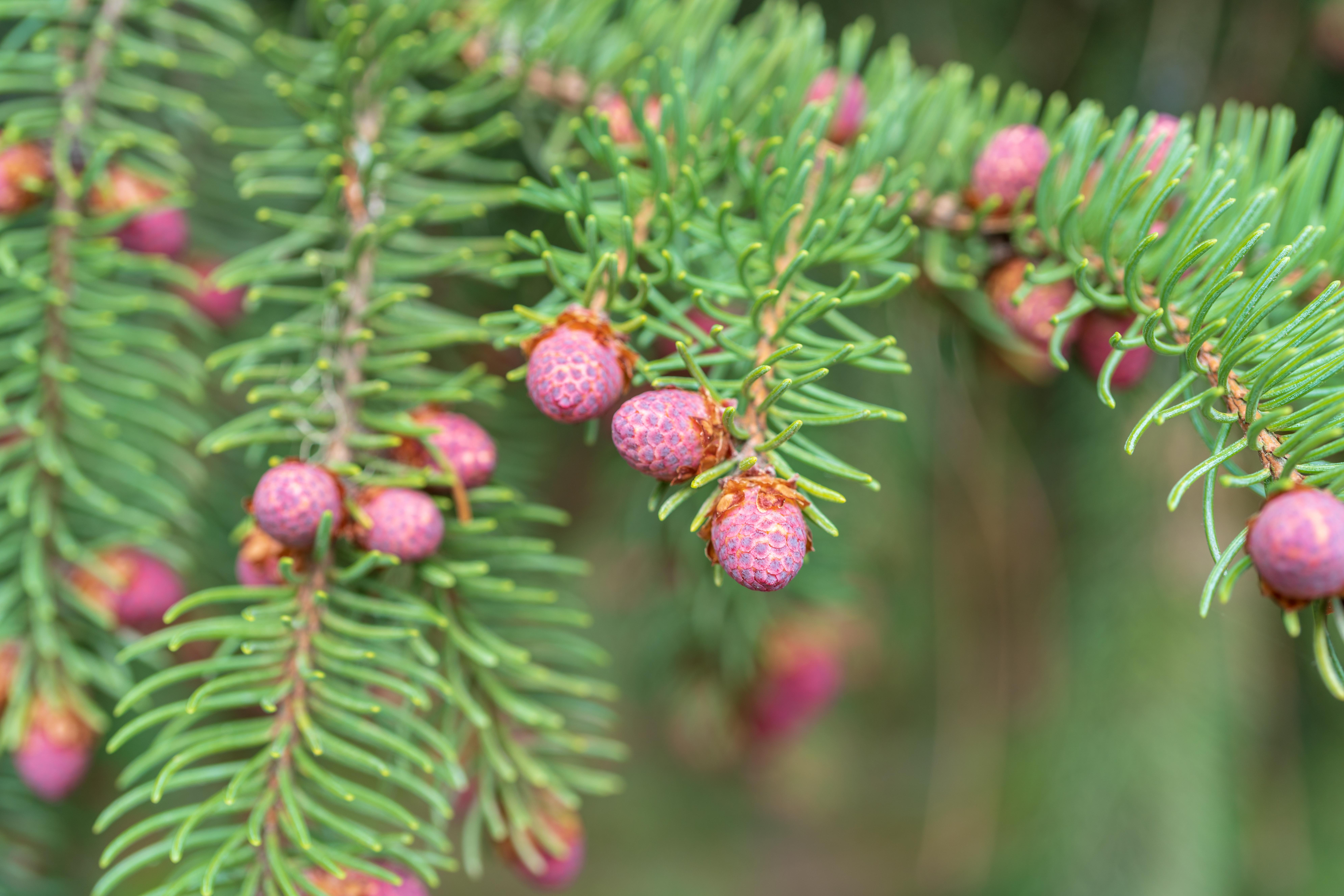 Am Schluchsee